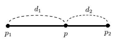 선형 보간법을 설명하기 위한 1차원 그래프